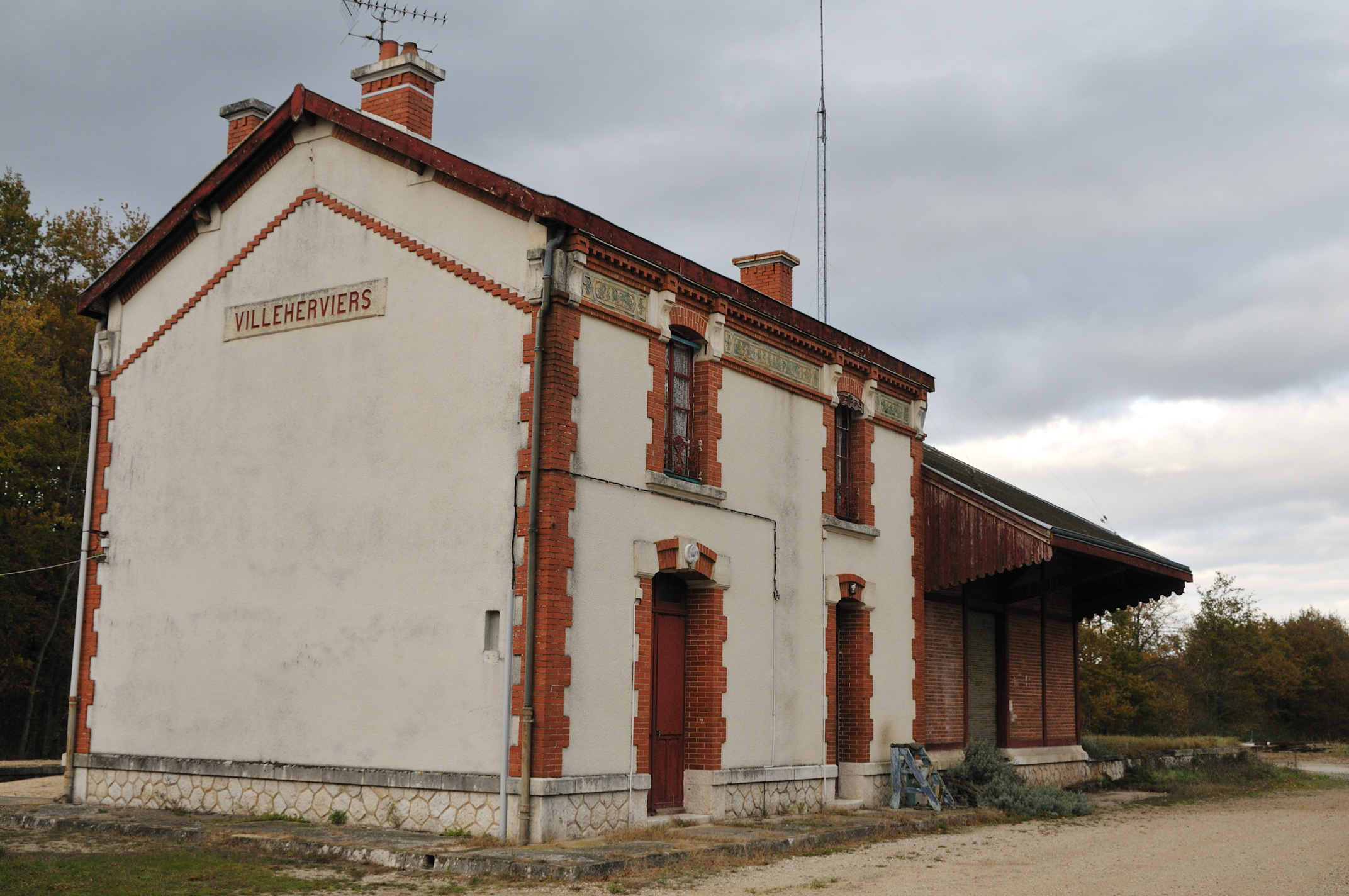 Gare de Villeherviers, Loir-et-Cher, France